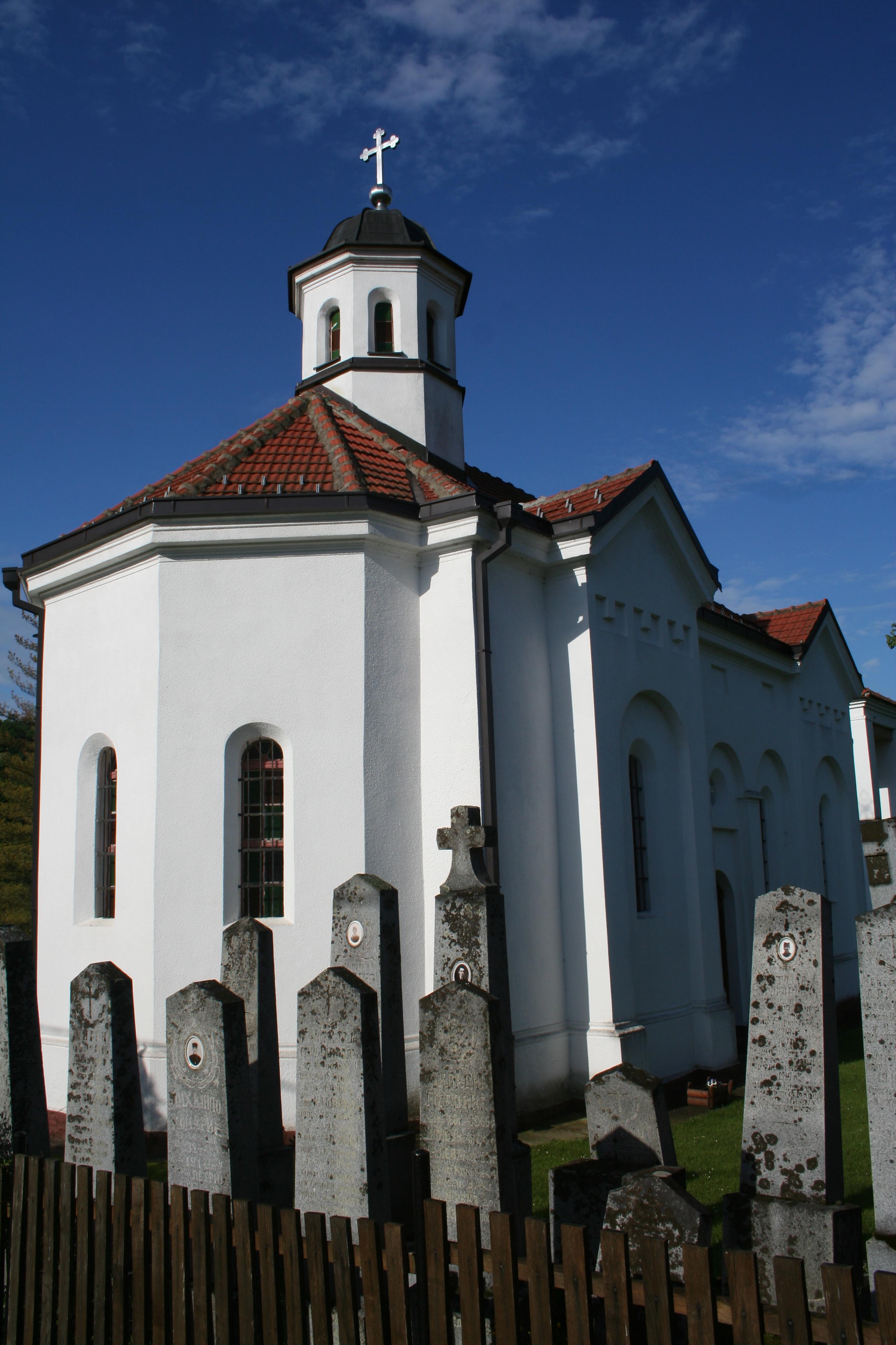 Crkva Vaznesenja Gospodnjeg (Cvetulja)